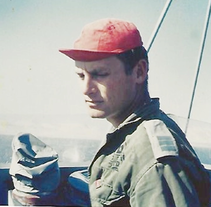 עמי אילון כמפקד פלגת הדבורים בים האדום